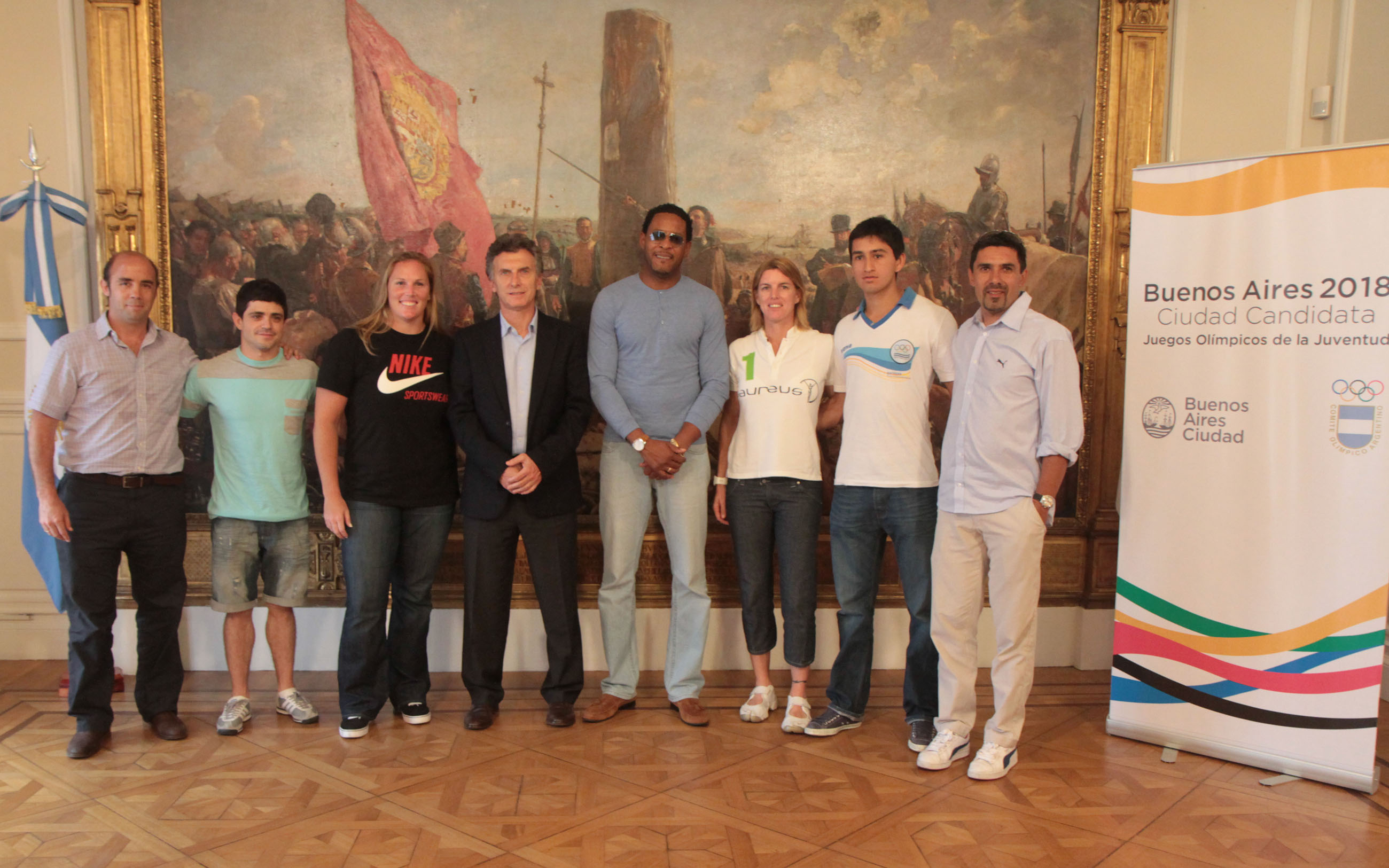 Buenos Aires, 19 de Noviembre de 2012. El jefe de Gobierno de la ciudad de Buenos Aires, Mauricio Macri, recibió hoy al atleta cubano Javier Sotomayor. El encuentro, celebrado en el Salón Blanco del palacio municipal, también contó con la presencia de los atletas argentinos Federico Molinari, Alejandra García, Carlos Gats, Jennifer Dahlgren y Carlos Laloy. Fotos: Matías Repetto-gv/GCBA